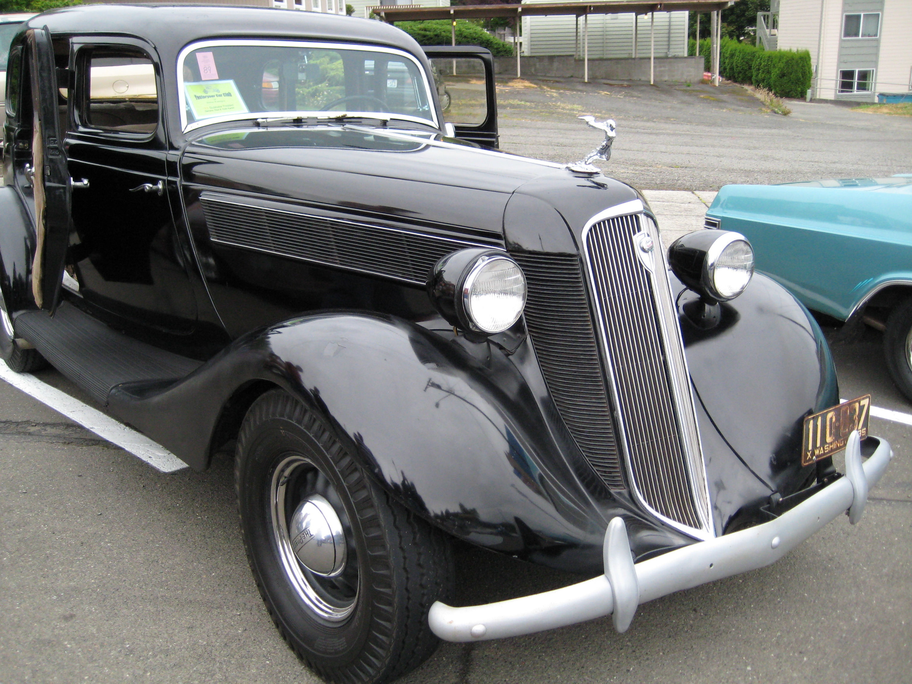 1935 Studebaker President